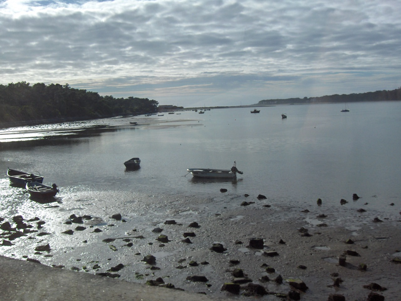 River Minho (Portuguese side) ; border Spain/Portugal